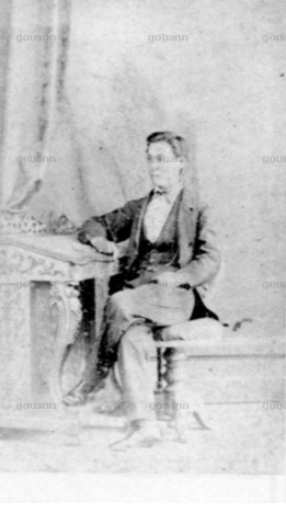 井関盛艮旧蔵アルバム108 神奈川県二等訳官 野口源之助 （撮影 ホンコン）